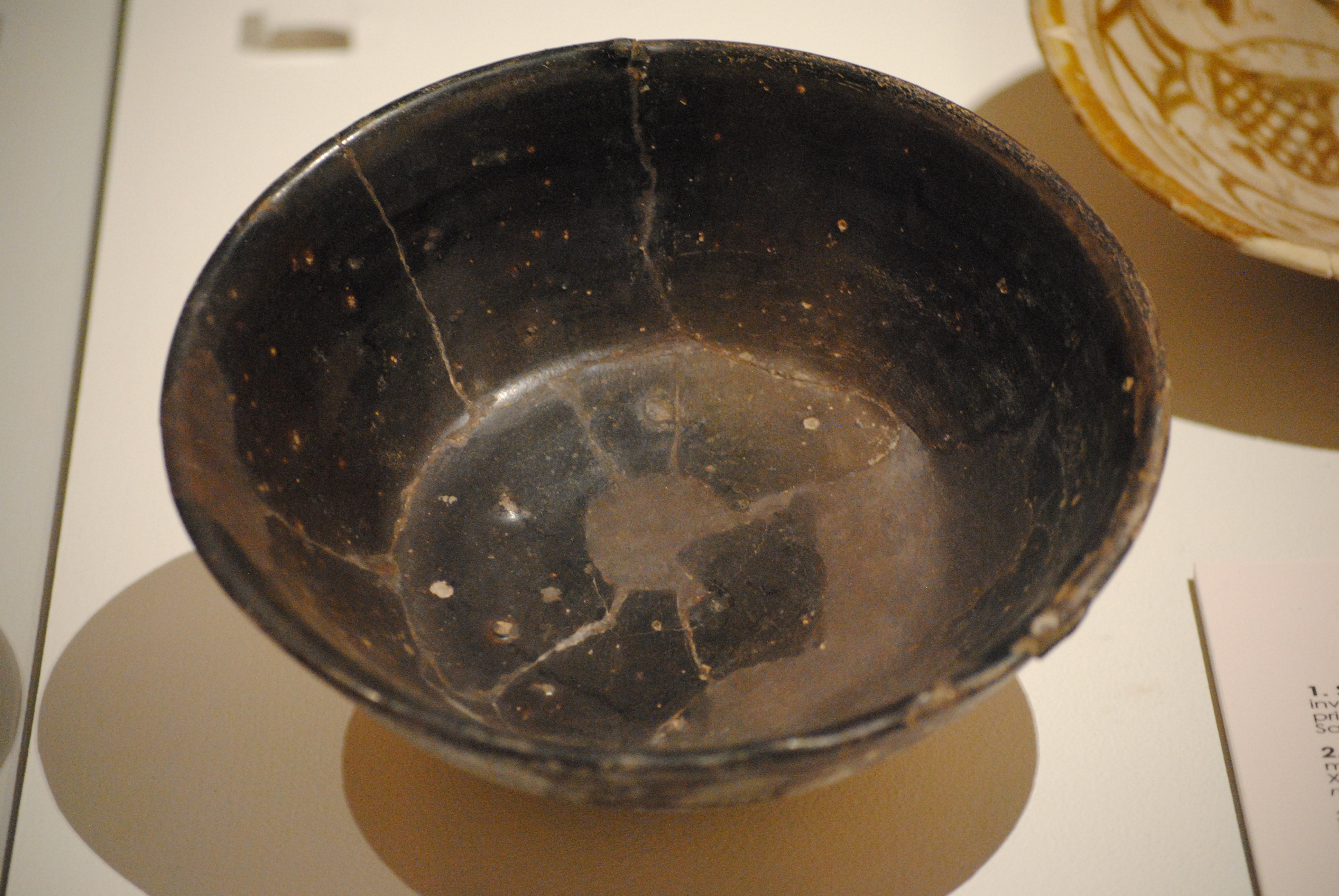 Scodella invetriata monocroma usata come bacino ceramico - importata dal Vicino Oriente nel primo quarto del XII secolo (chiesa di Sant'Andrea Fuorisportam, Pisa) - Museo nazionale di San Matteo.